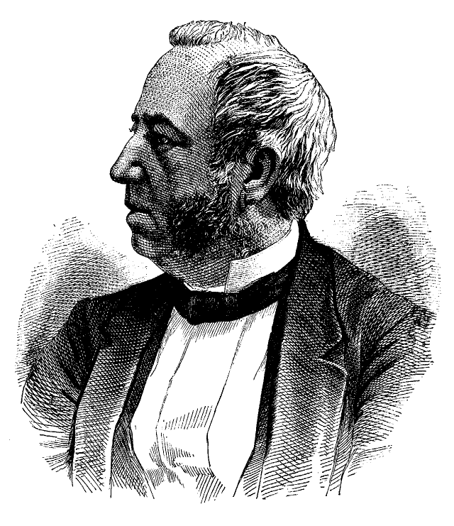 illustration du livre importé sur Wikisource - P.J.O. Chauveau